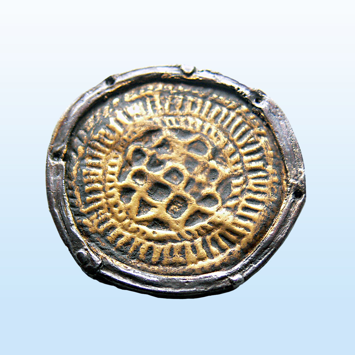 Fränkische Brakteat - Fibel aus Goldblech mit Silberfassung aus dem 7.Jahrhundert (Replik),Durchmesser ca 5cm. Fundort: Frauengrab in Rödersheim-Gronau im Jahr 1891, Original 1945 in Berlin verschollen. Verwahrort: Museum Rödersheim-Gronau